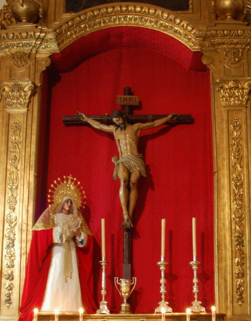 Altar del Cristo de la Plaza y la Virgen de Gracia y Esparanza